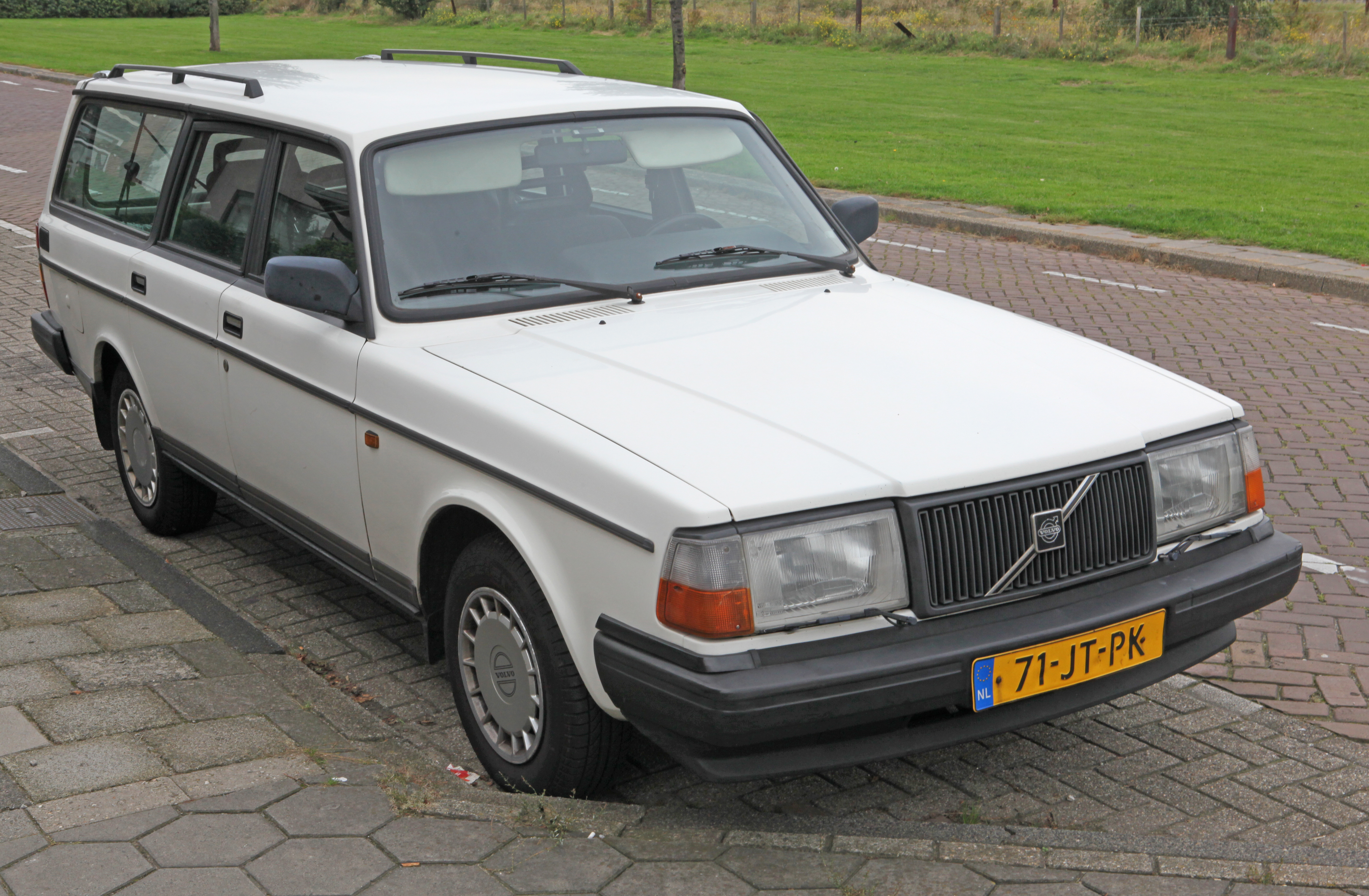 1990 Volvo 240 GL